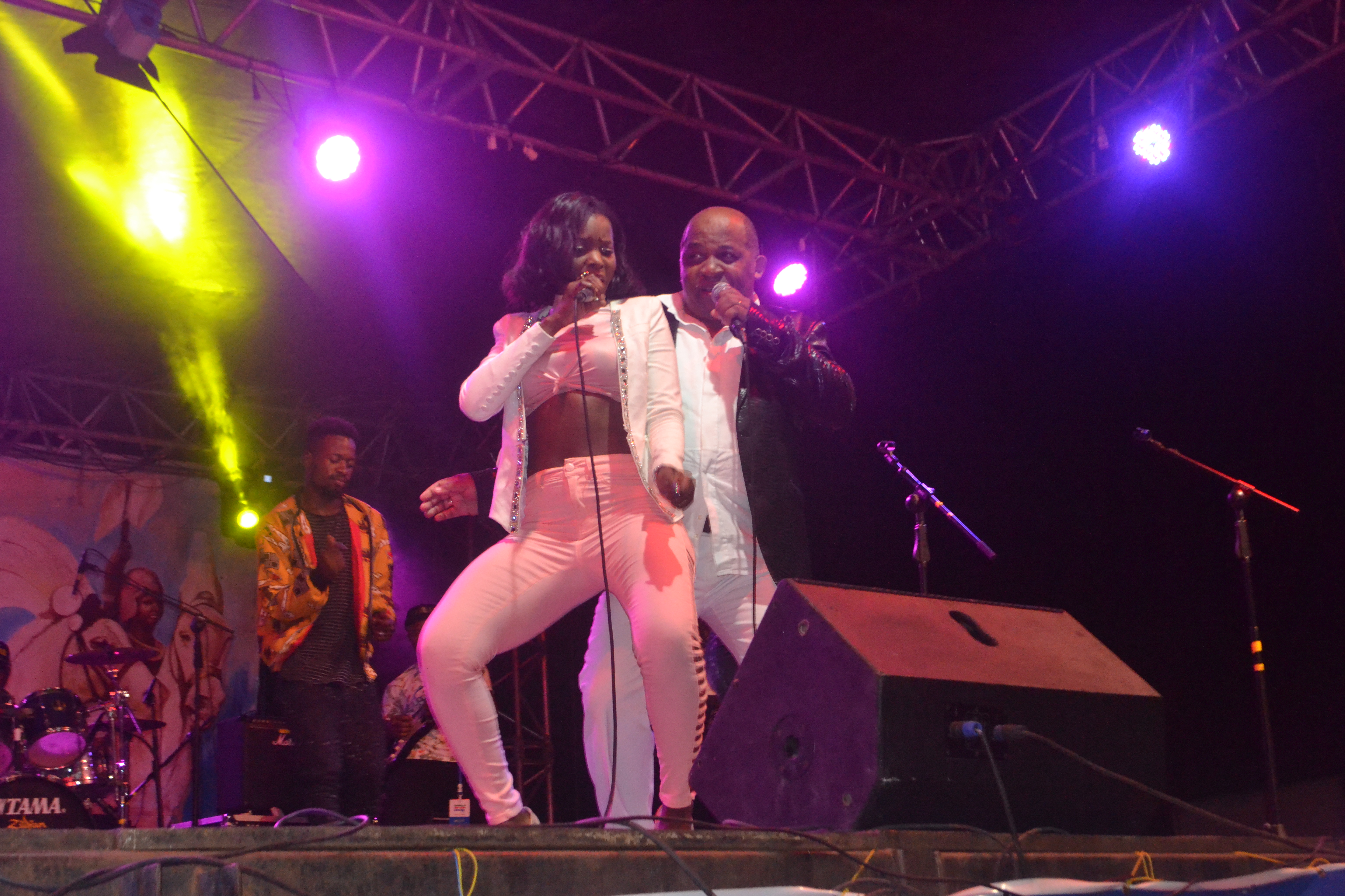 Le chanteur BEN DECCA et la chanteuse Camerounaise Daphne Njiè Efunde sur la scène du Douala Hip Hop Festival en Décembre 2017